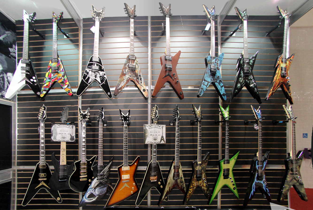 Expomusic 2014